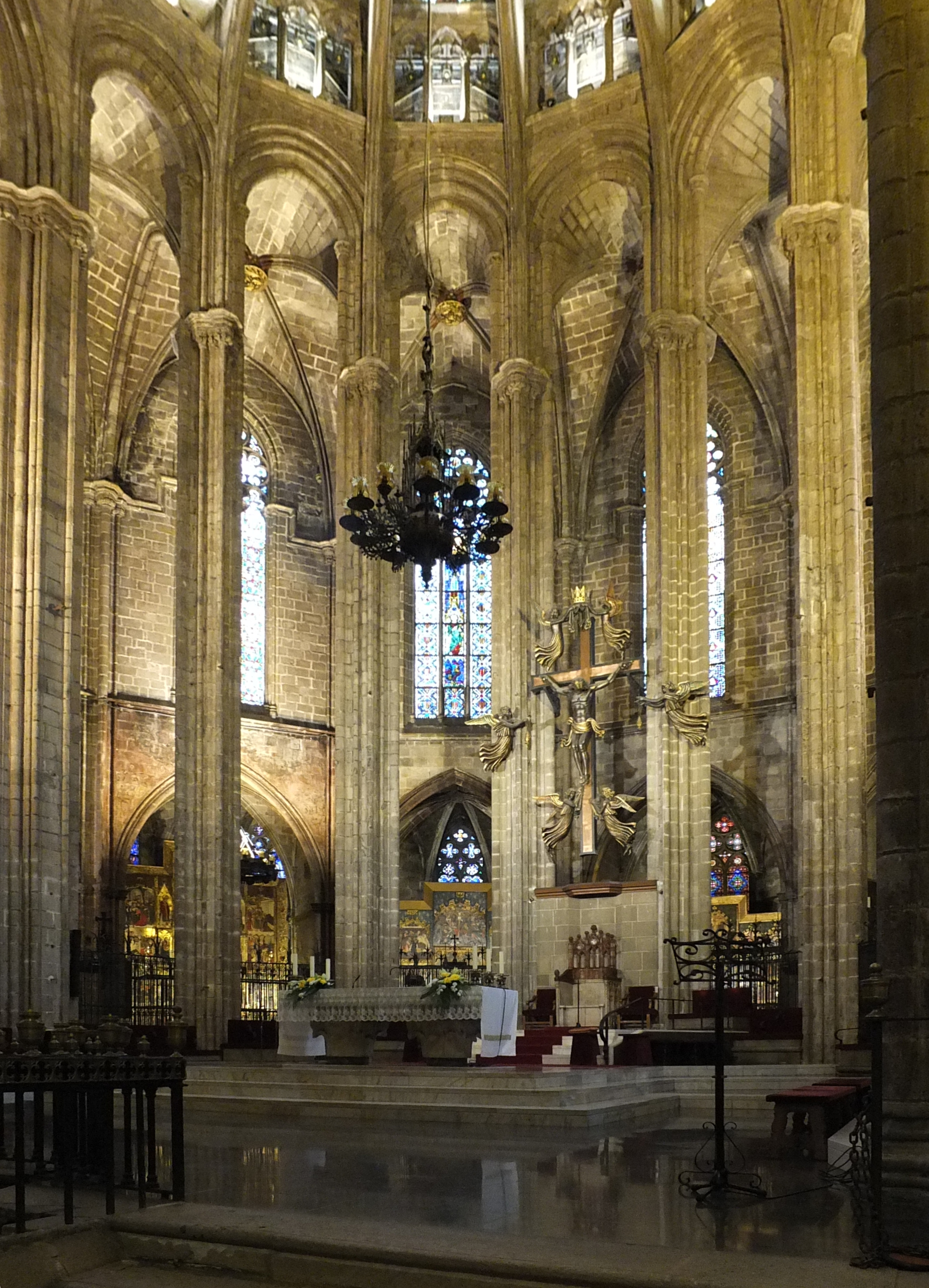 Het interieur van de Kathedraal van het Heilig Kruis en Sint Eulalia te Barcelona.